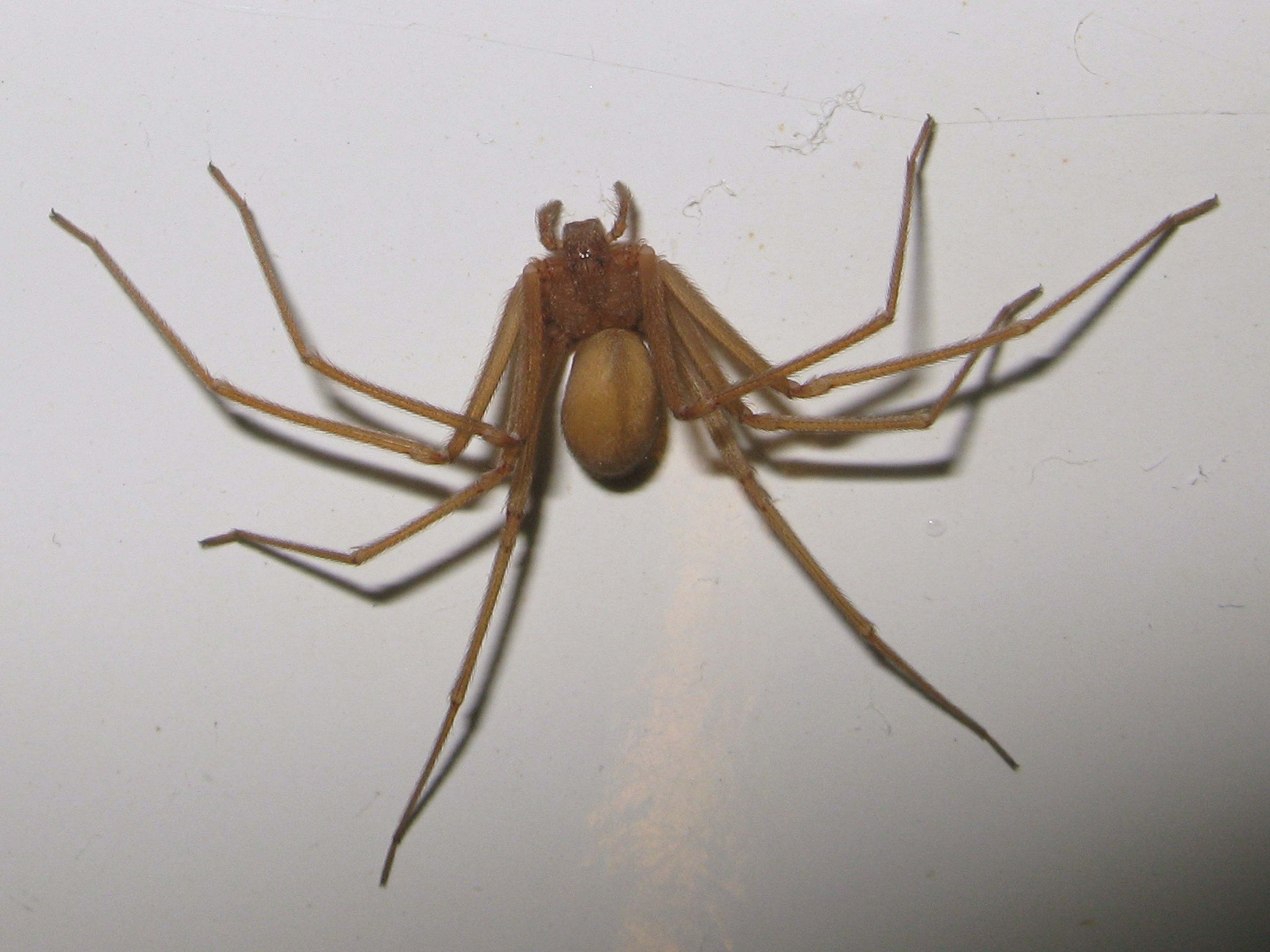 El género Loxosceles, comunmente conocido como arañas reclusas o arañas violín, presenta una distribución prácticamente mundial en áreas templadas. Los miembros de esta familia, como la mayoría de las haploginas, tienen solamente seis ojos en vez de ocho. Poseen un potente veneno necrotizante (destruye los tejidos vivos) el cual sólo se encuentra en arañas de esta familia y en un par de bacterias patógenas. Tan alto efecto necrotizante posee el veneno Sicaiidae que es capaz de causar lesiones (llagas abiertas) Las llagas tardan mucho tiempo en sanar y hasta pueden llegar a requerir injertos de piel. Si estas llagas abiertas se infectan pueden presentarse serias consecuencias.